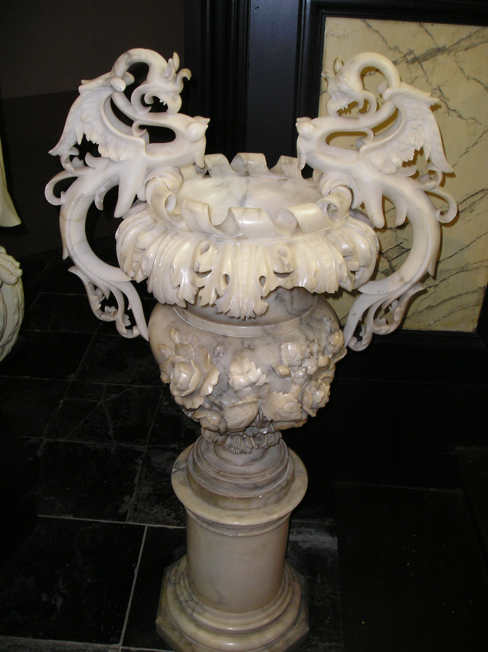 Sint Elisabethskerk Grave - marmer uit Italië